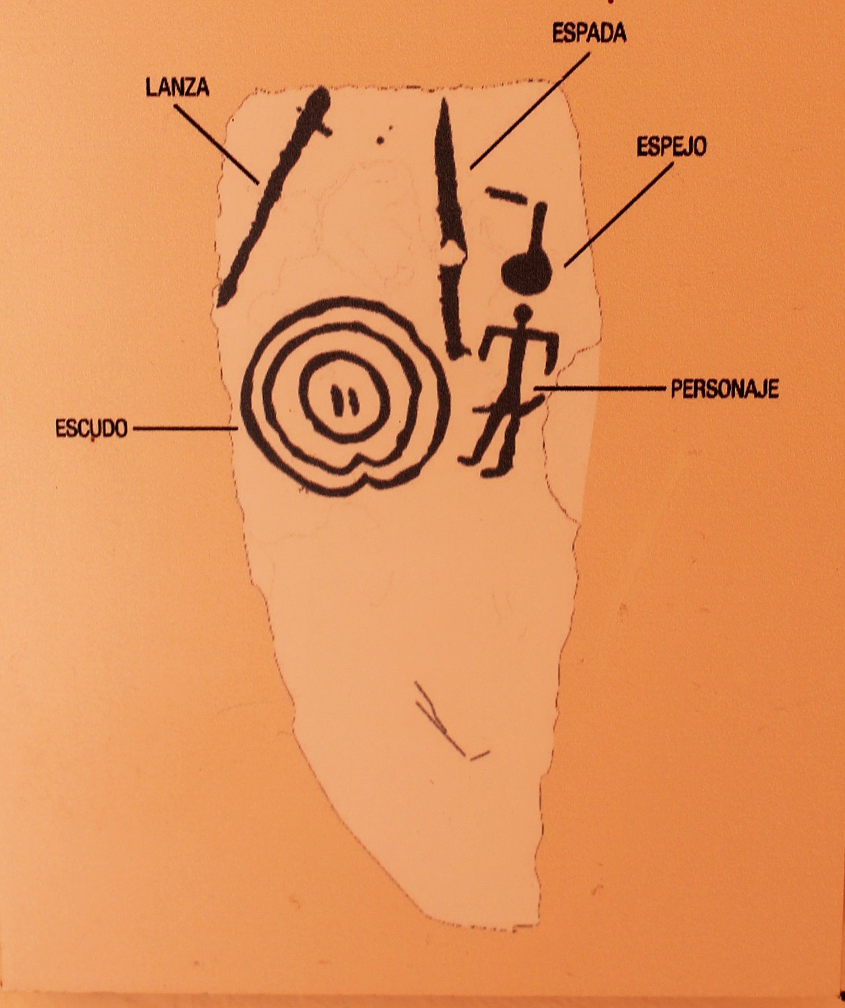 Esquema estela de guerrero. Siglo VII-VI a.C Vega de San Miguel, Capilla, Badajoz